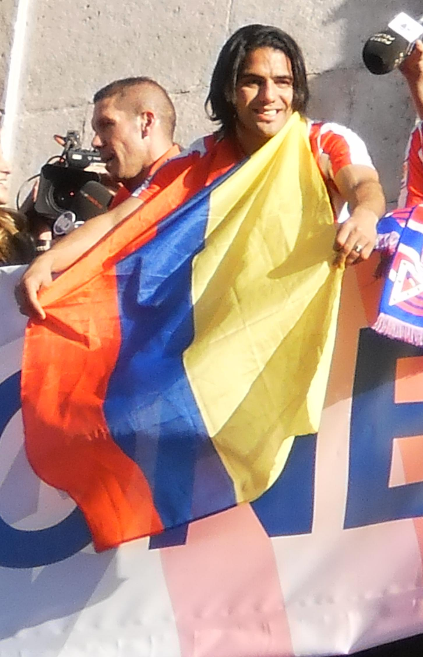 El jugador del Atlético de Madrid celebrando el título en la Puerta del Sol (Madrid).